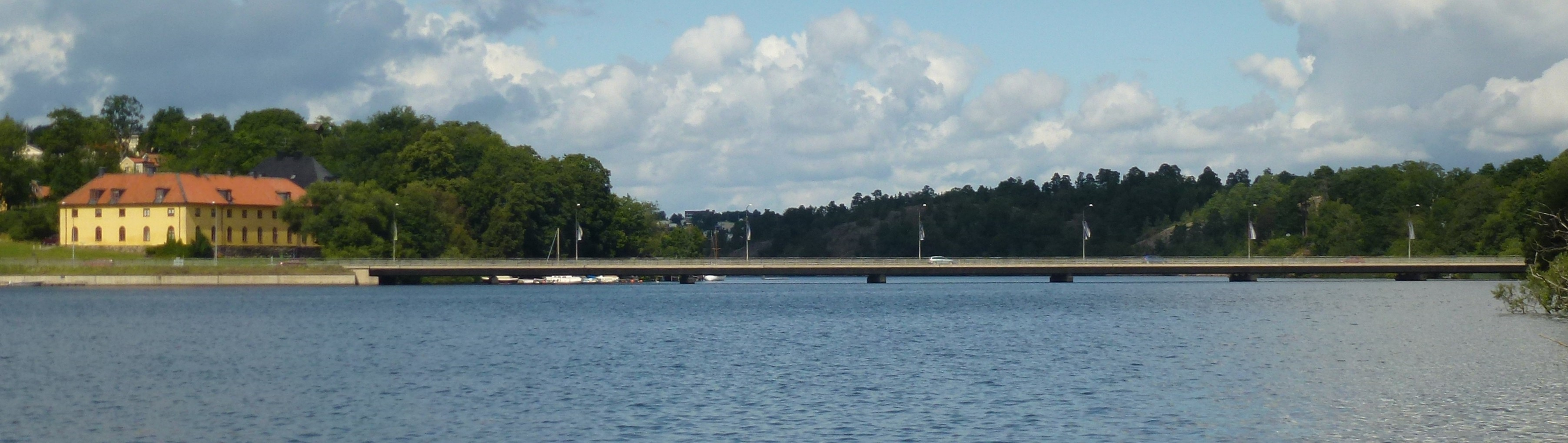 Drottningholmsbron panorama vy från Kärsön